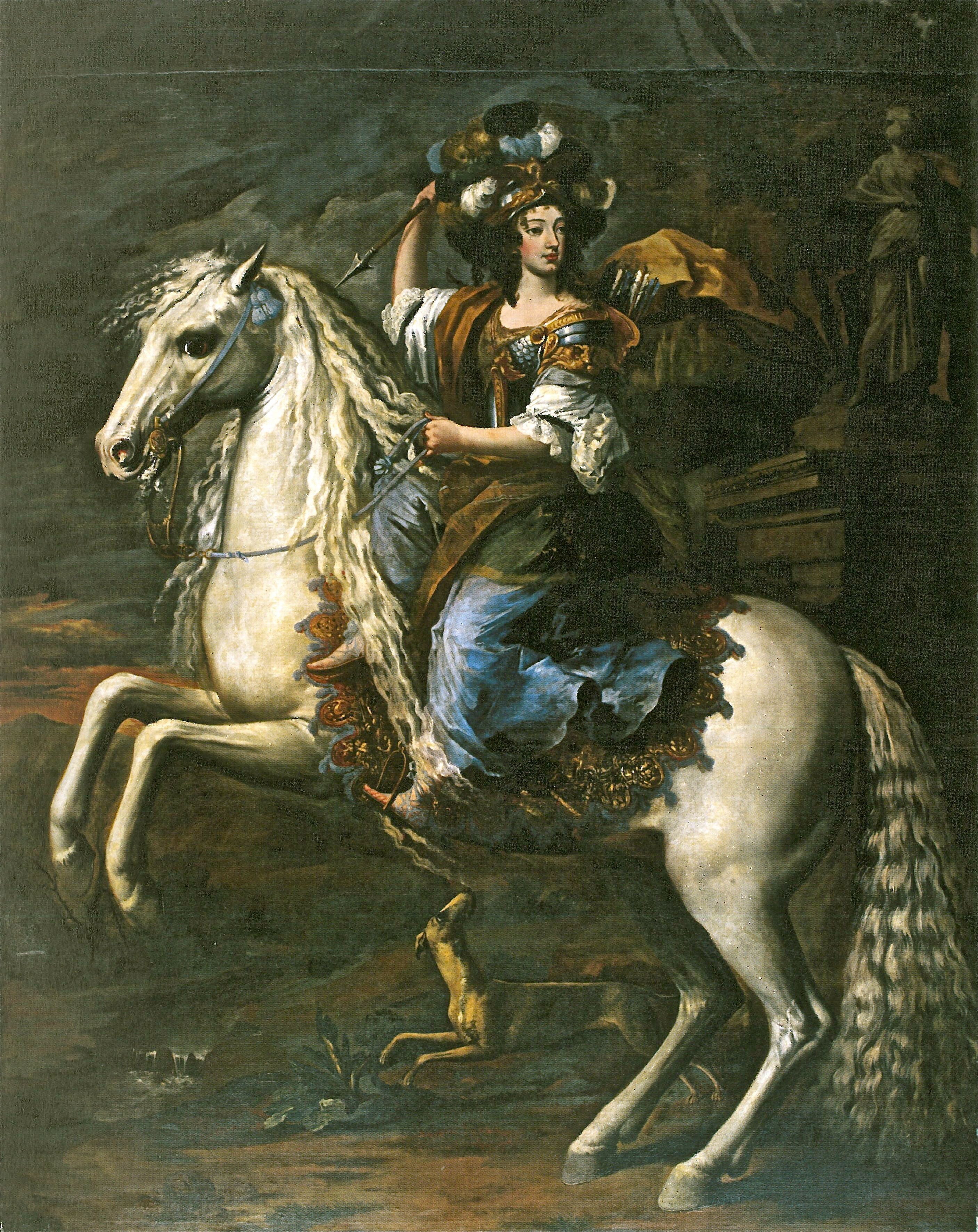 Allegorisches Porträt Christinas von Frankreich während ihrer Zeit als Regentin Savoyens